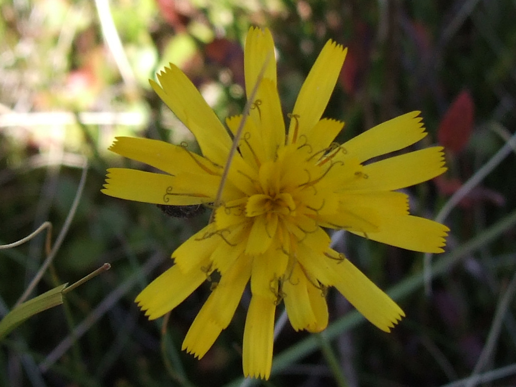 Hieracium lachenalii (pl. jastrzębiec Lachenala)